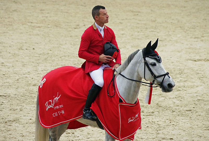 Pius Schwizer et Coolgirl lors de sa victoire dans le prix French Tour EADS lors du CSIW-5* d'Equita-Lyon (vendredi 2 novembre 2012)